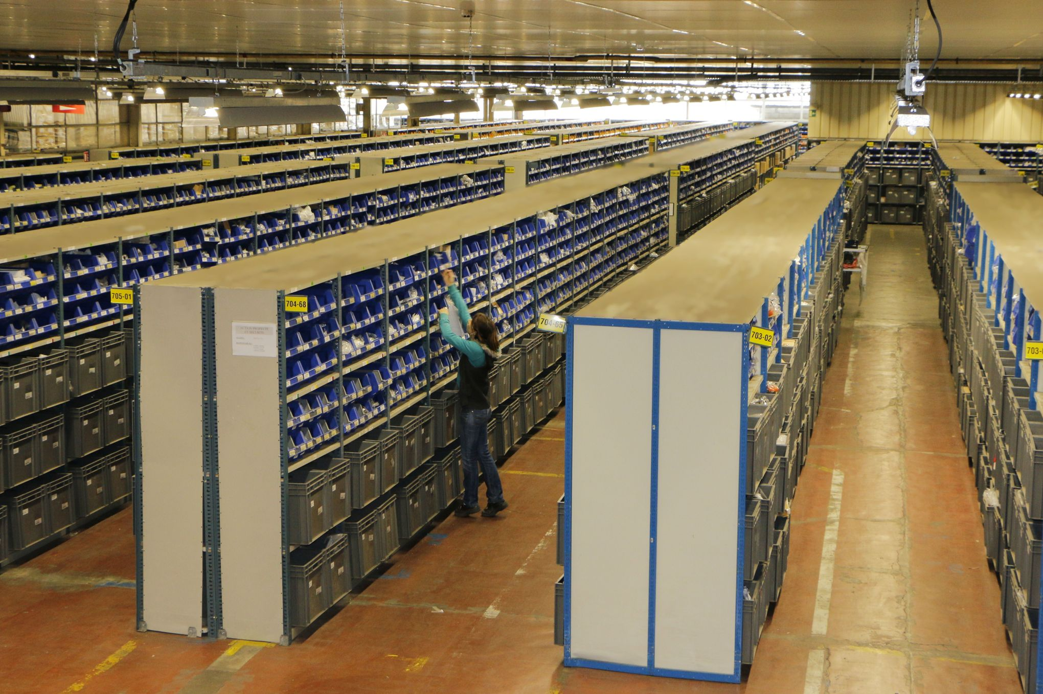 Usine du Groupe SEB de stockage des pièces détachées à Faucogney-et-la-Mer